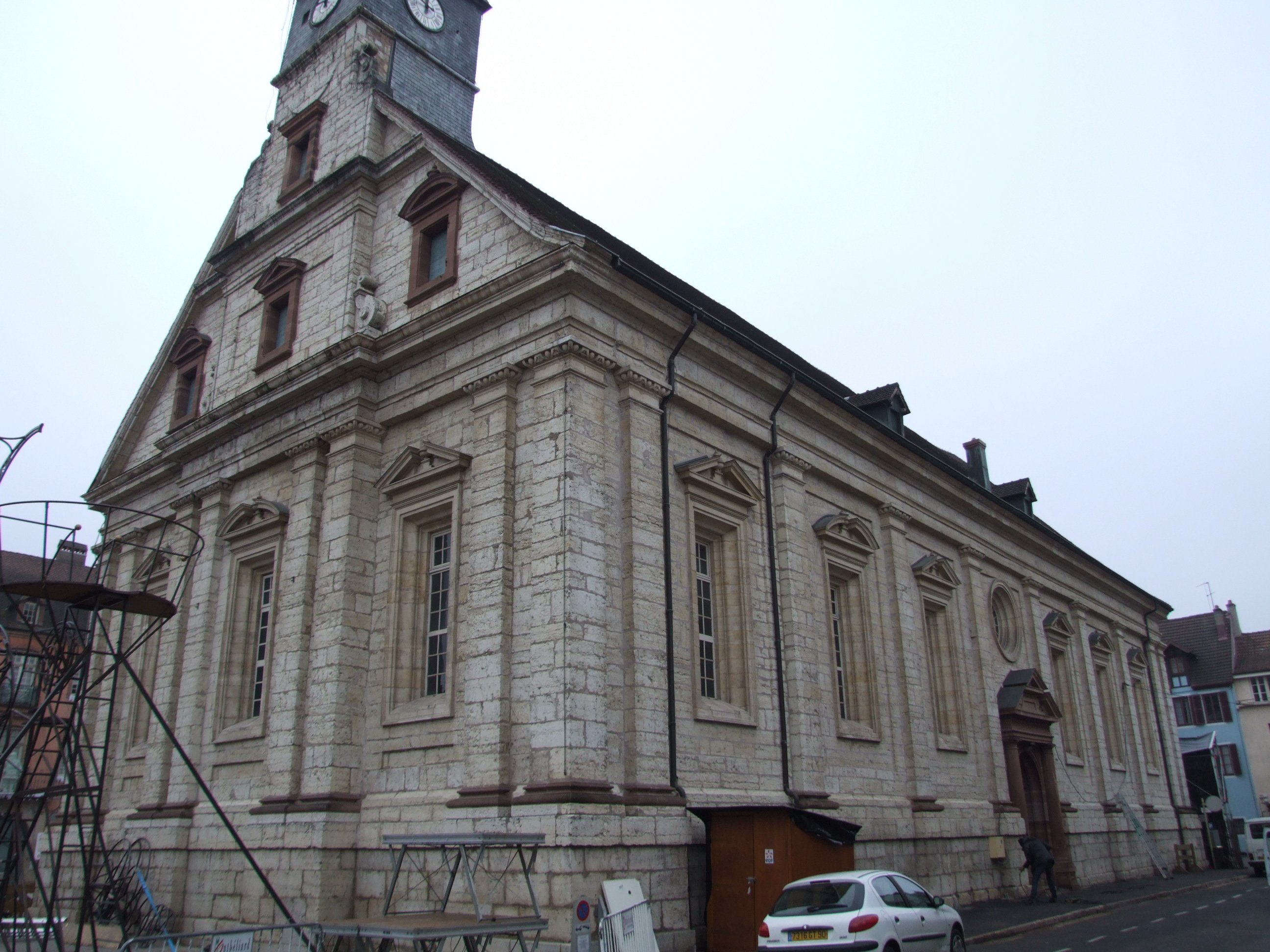 Temple Saint-Martin de Montbéliard, Montbéliard, Doubs, Franche-Comté, FRANCE